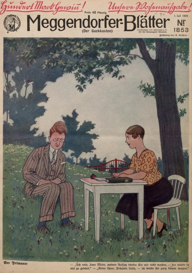 Titelseite der Zeitschrift „Meggendorfer-Blätter“, 1926. Zeichnung von Kirchner, Eugen (1865-1938).